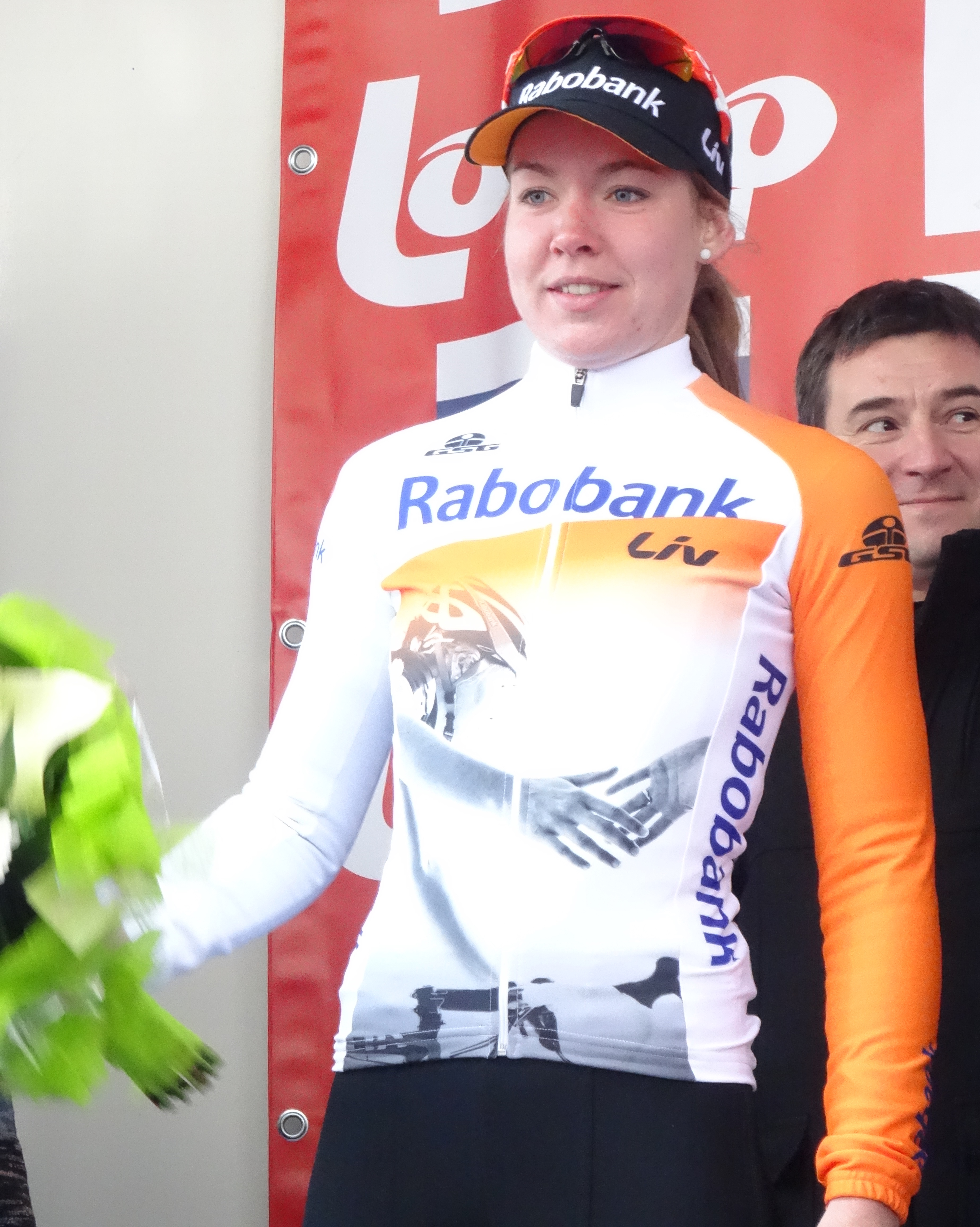 Reportage réalisé le mercredi 4 mars à l'occasion de l'arrivée du Samyn des Dames 2015 et du Samyn 2015 à Dour, Belgique.